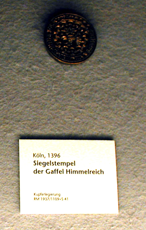 Köln, Siegelstempel der Gaffel Himmelreich 1396 (Zeughaus Köln)